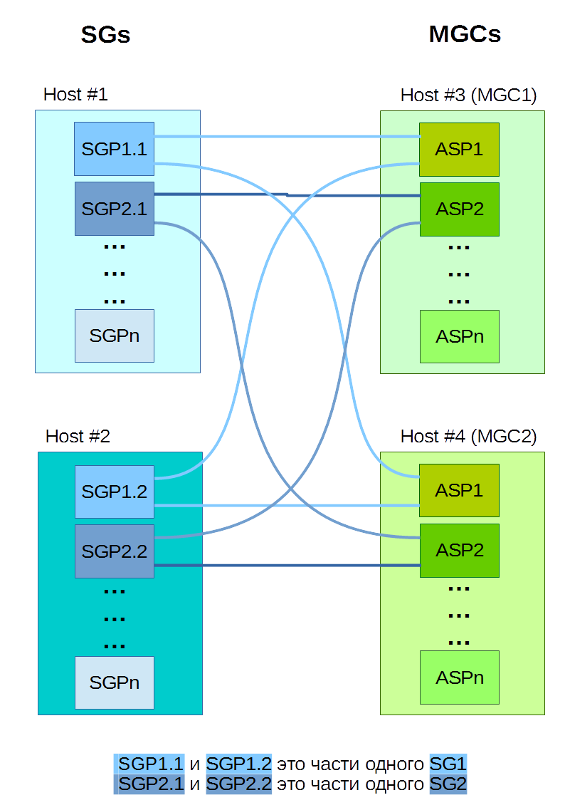 M3UA Physical Model from RFC 4666, Appendix A.1. Signalling Network Architecture [Page 118]